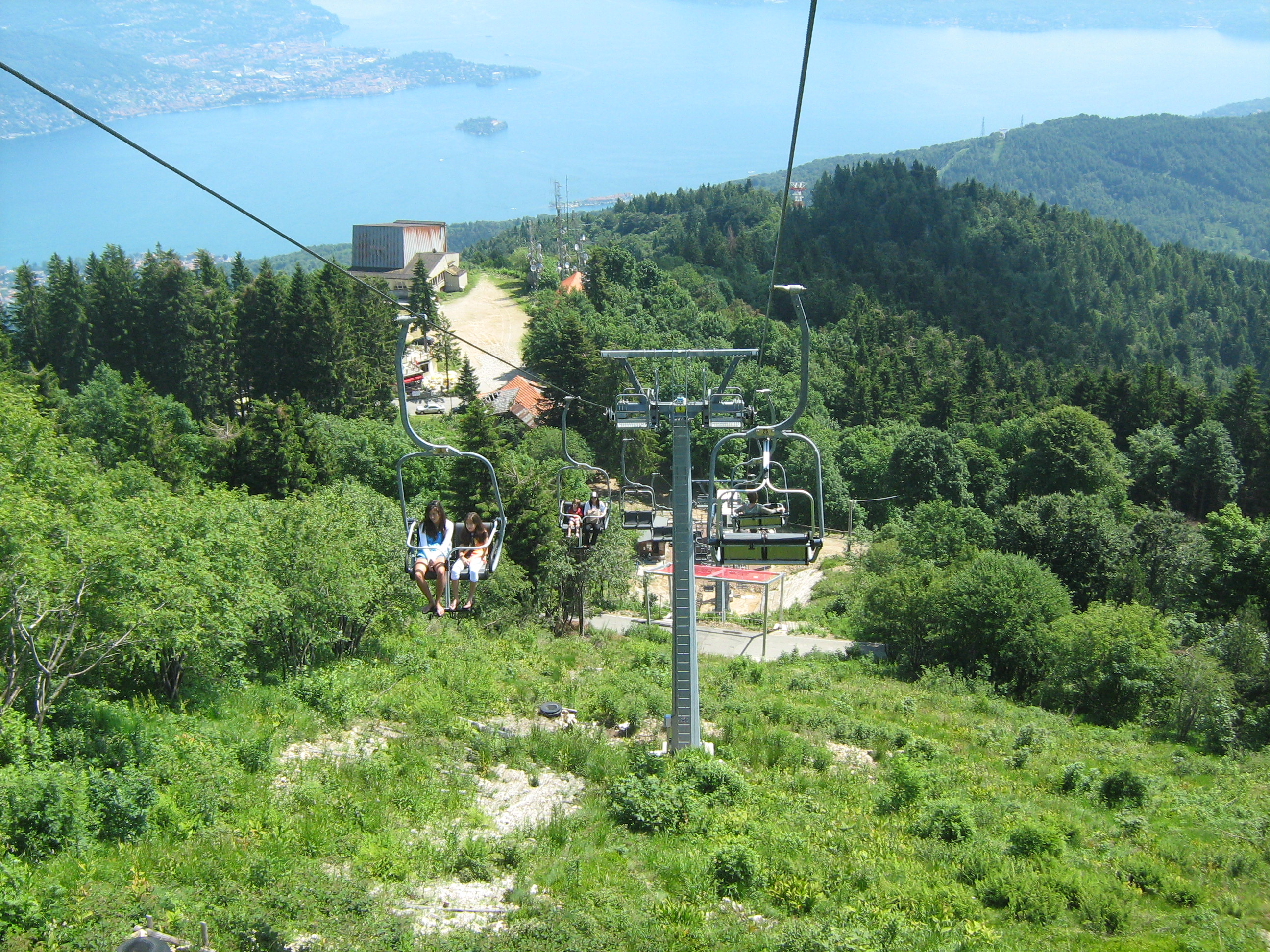 2. etape foregår i to-sædet stolelift. Bygningen i baggrunden er 1. etapes øverste station.